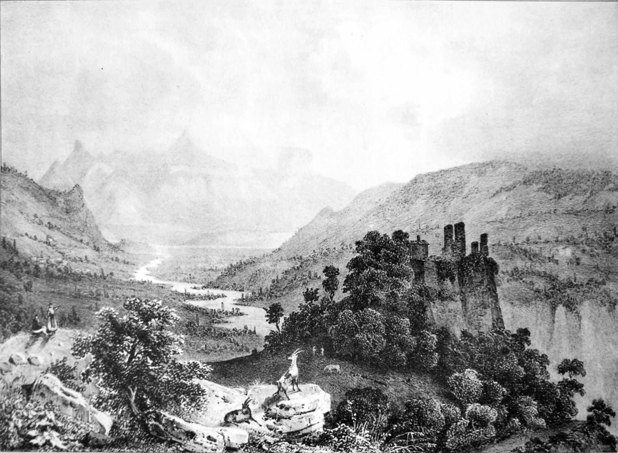 vallée de la Gresse, environs de la fontaine ardenteATTENTION ! Ce facsimilé est réalisé en applicant des alterations avec un logiciel graphique à une copie numérique, obtenue à partir d'une prise de photo faite par un non-professionnel. Elle pourrait ne pas être parfaitement réussie.